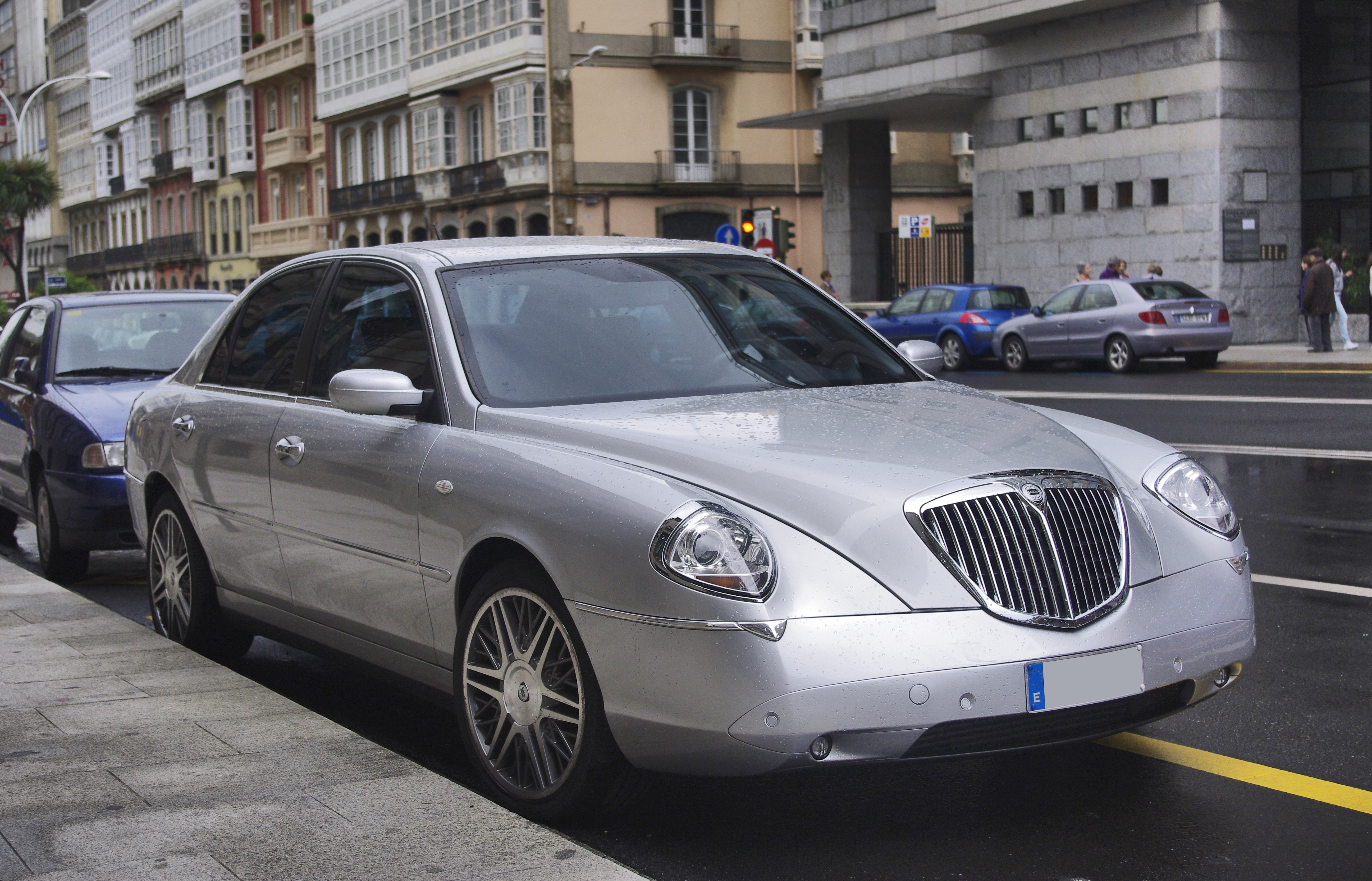 Love 'em...